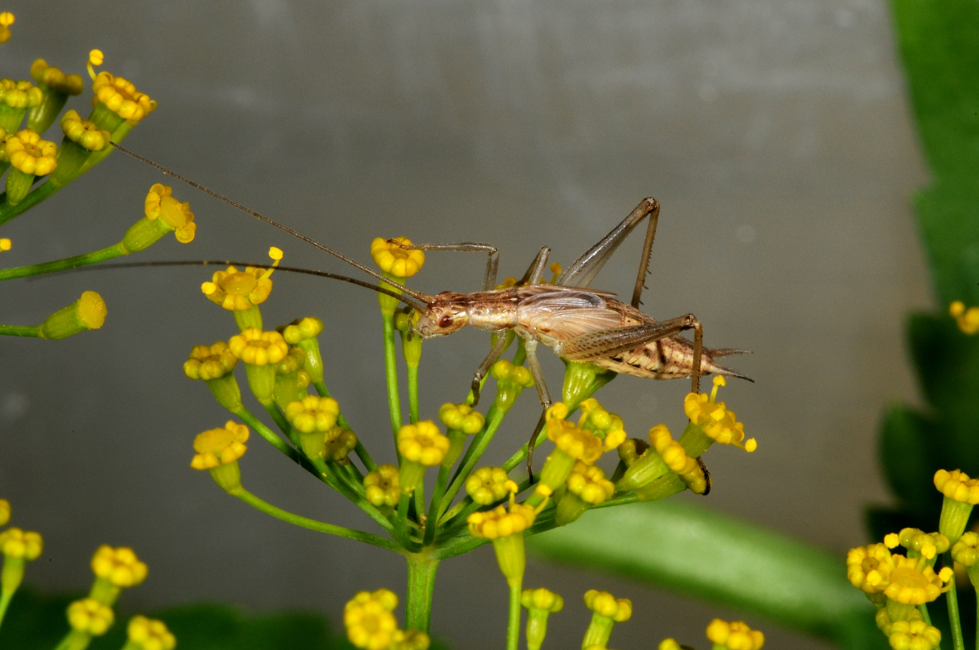 Oecanthus pellucens, Männchen, Mainzer Sand, Rheinland-Pfalz, Deutschland